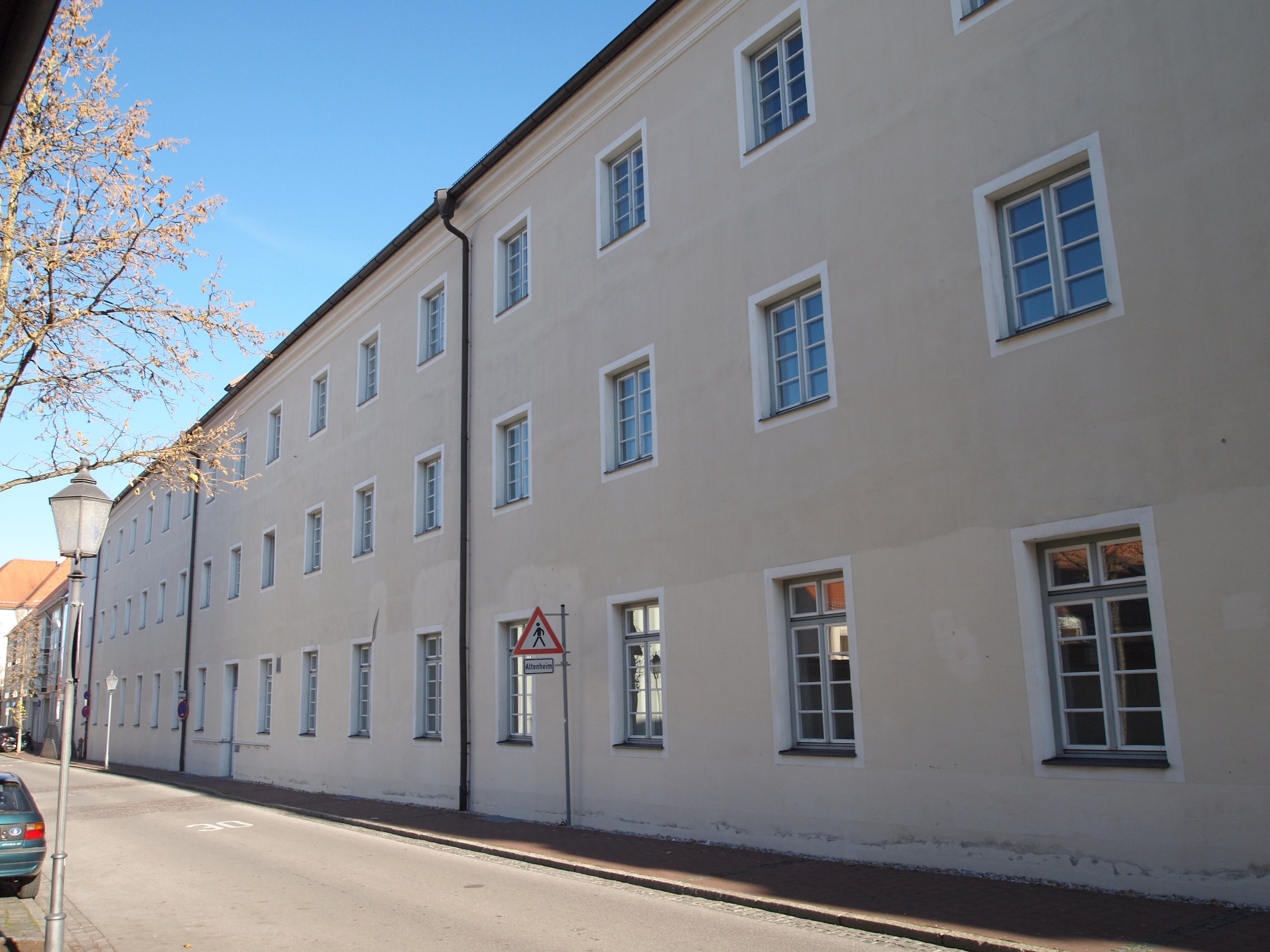 Schongau, Karmeliterstraße 8, Ehem. Karmeliten-Kloster, heute Altenheim